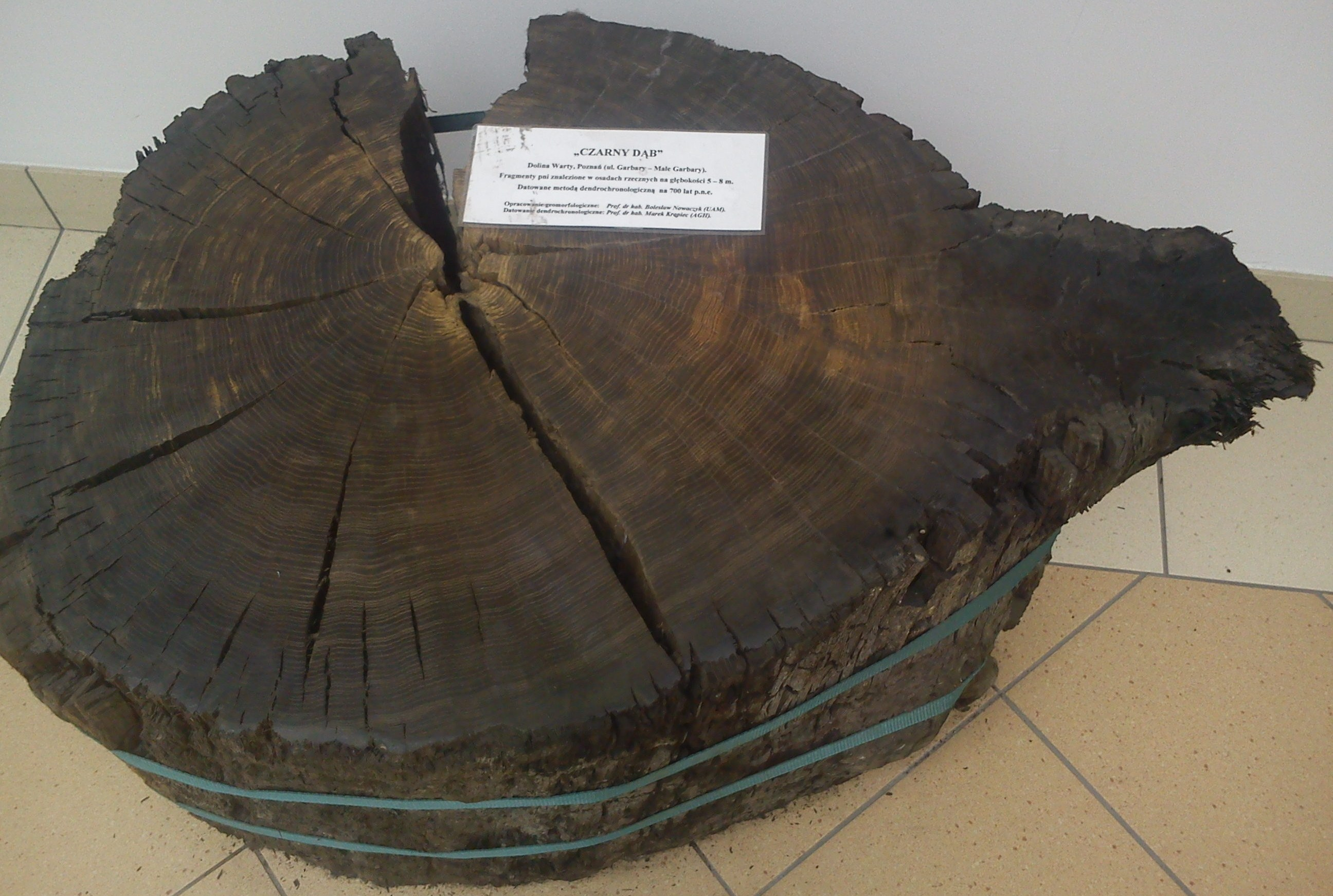 Hol Collegium Geologicum w Poznaniu (UAM). Kampus Morasko. Czarny dąb z Warty.